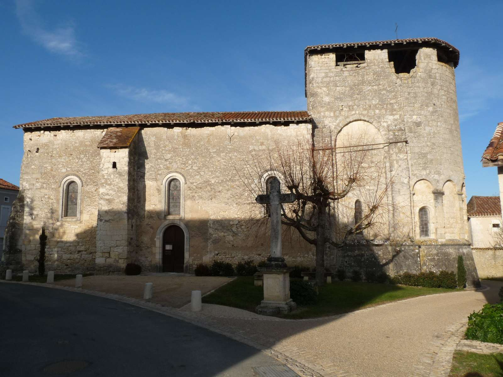 église de Festalemps, Dordogne, France